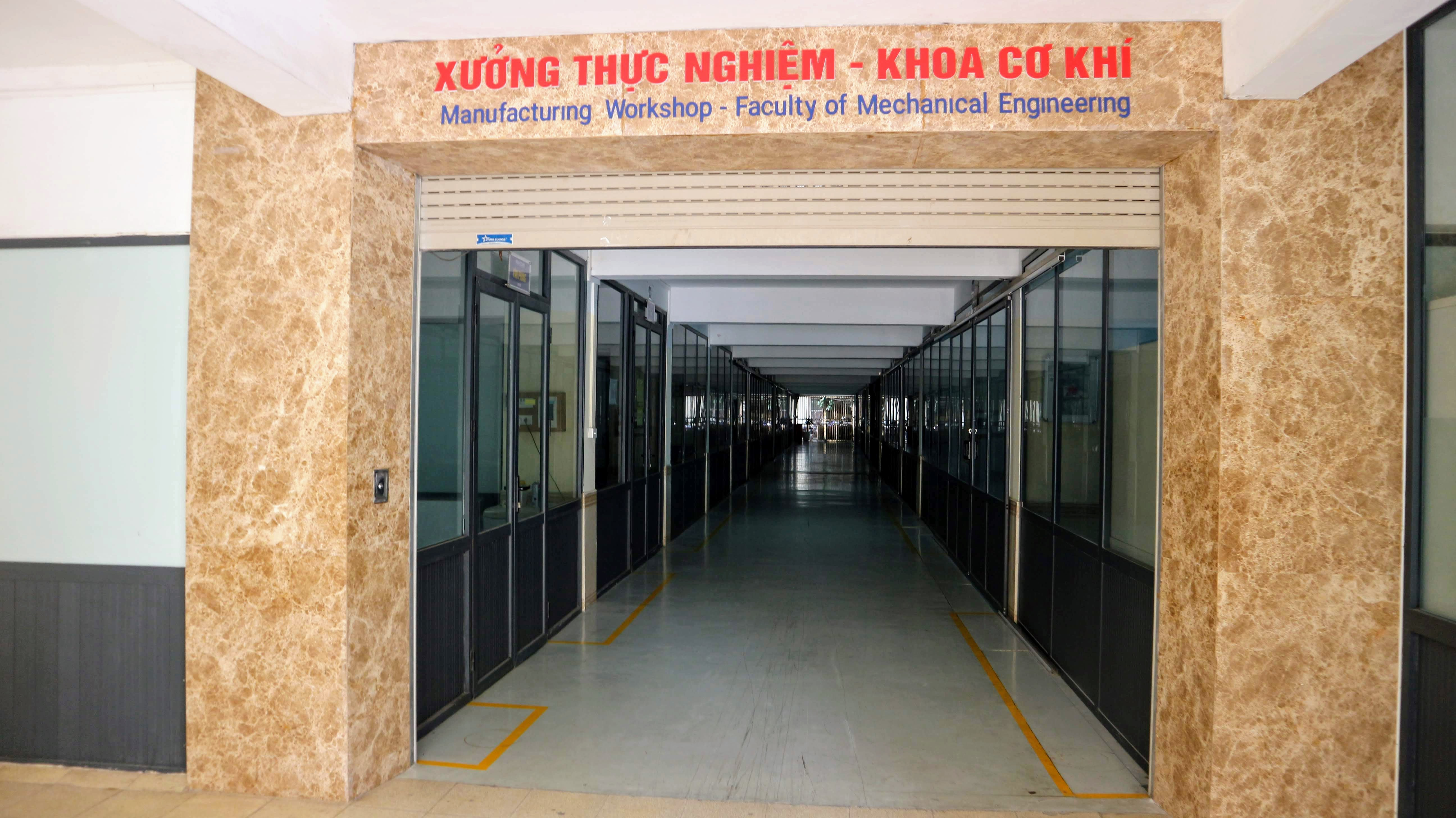 Trung tâm cơ khí, thuộc ĐH Công nghiệp HN